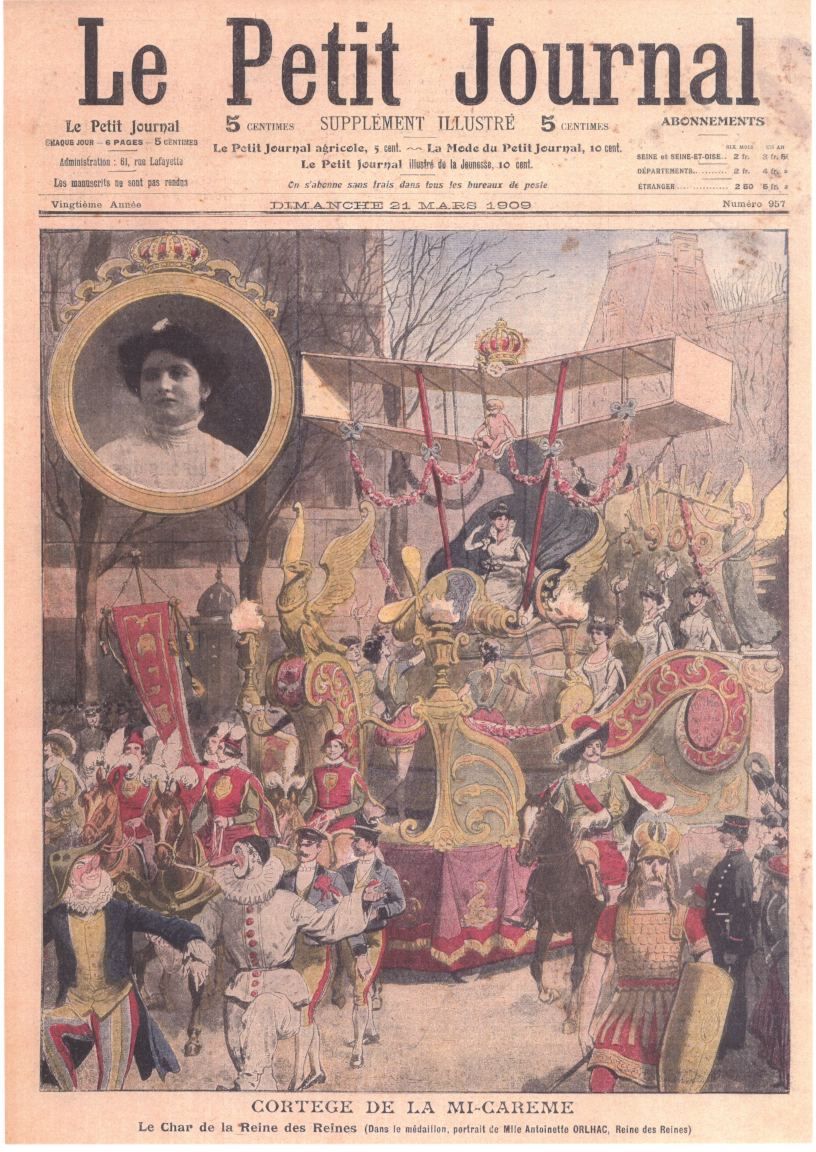 Char de la Reine des Reines de Paris 1909, Antoinette Orlhac et photo de celle-ci, en médaillon.